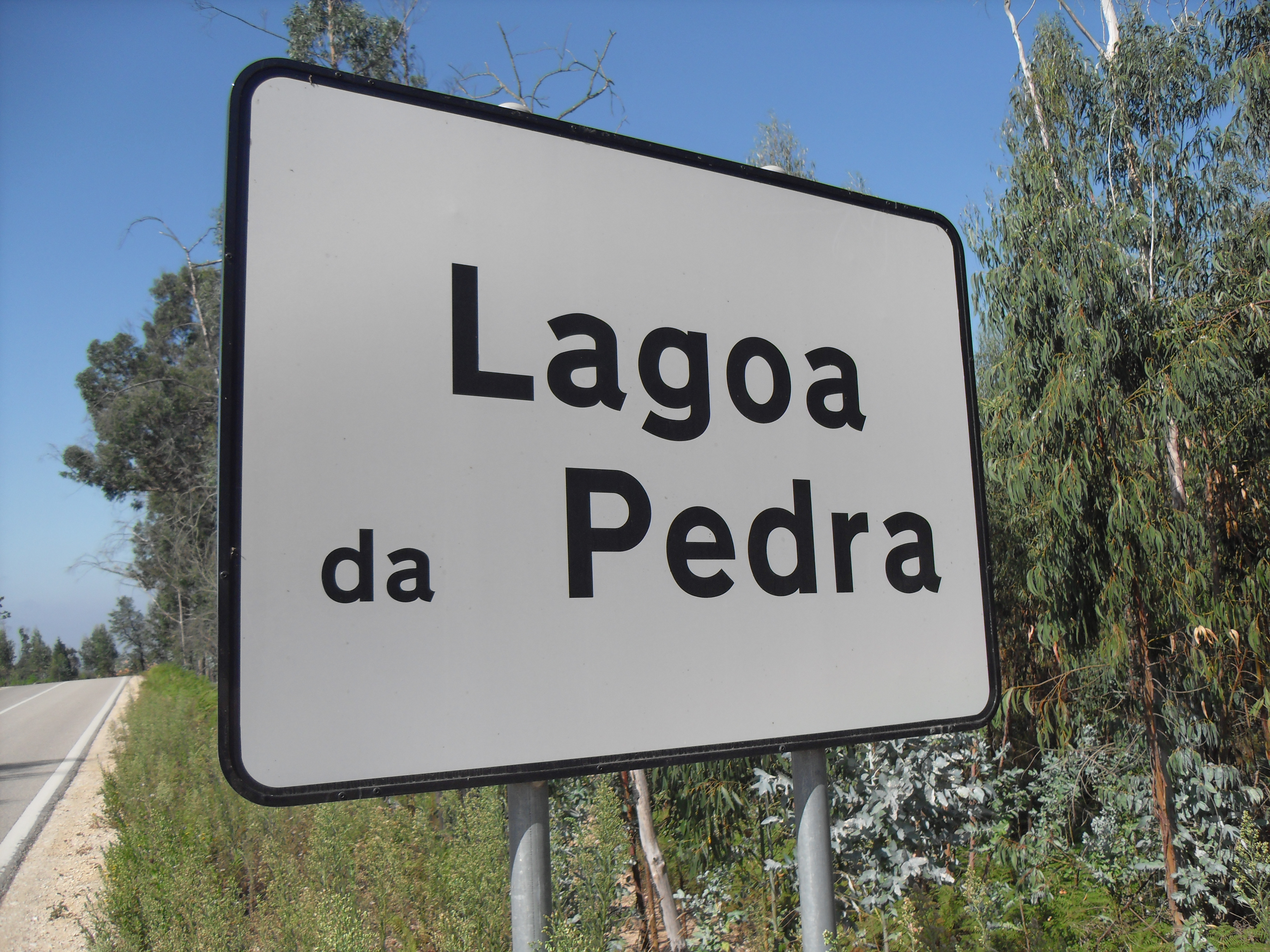 Panneau routier d'entrée du village de Lagoa Da Pedra.